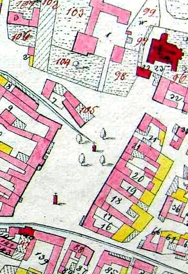 Der Hauptplatz von Sitzendorf an der Schmida im Franziszeischer Kataster von 1823